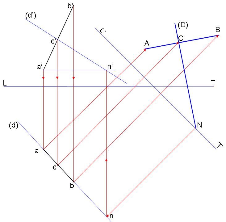 Construction graphique de la perpendiculaire à un segment de droite quelconque.